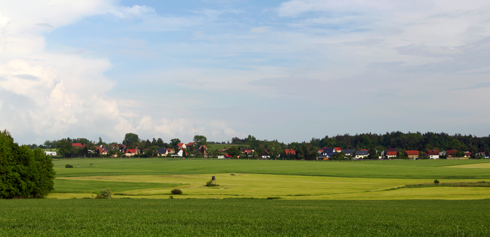 Stadtrandsiedlung Am Taubenberg